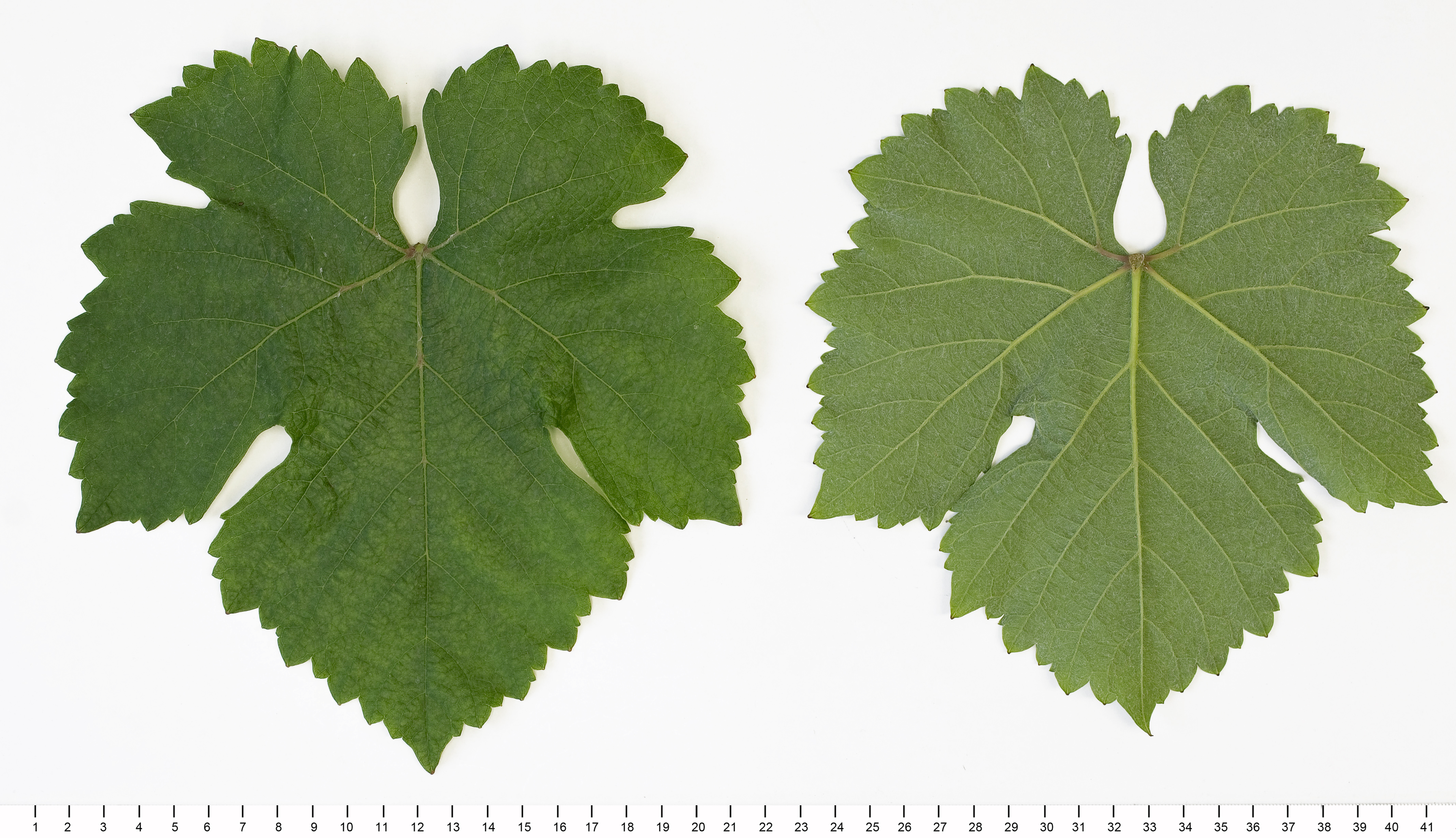 Ein Blatt der Rebsorte Grüner Veltliner (Ober- und Unterseite)